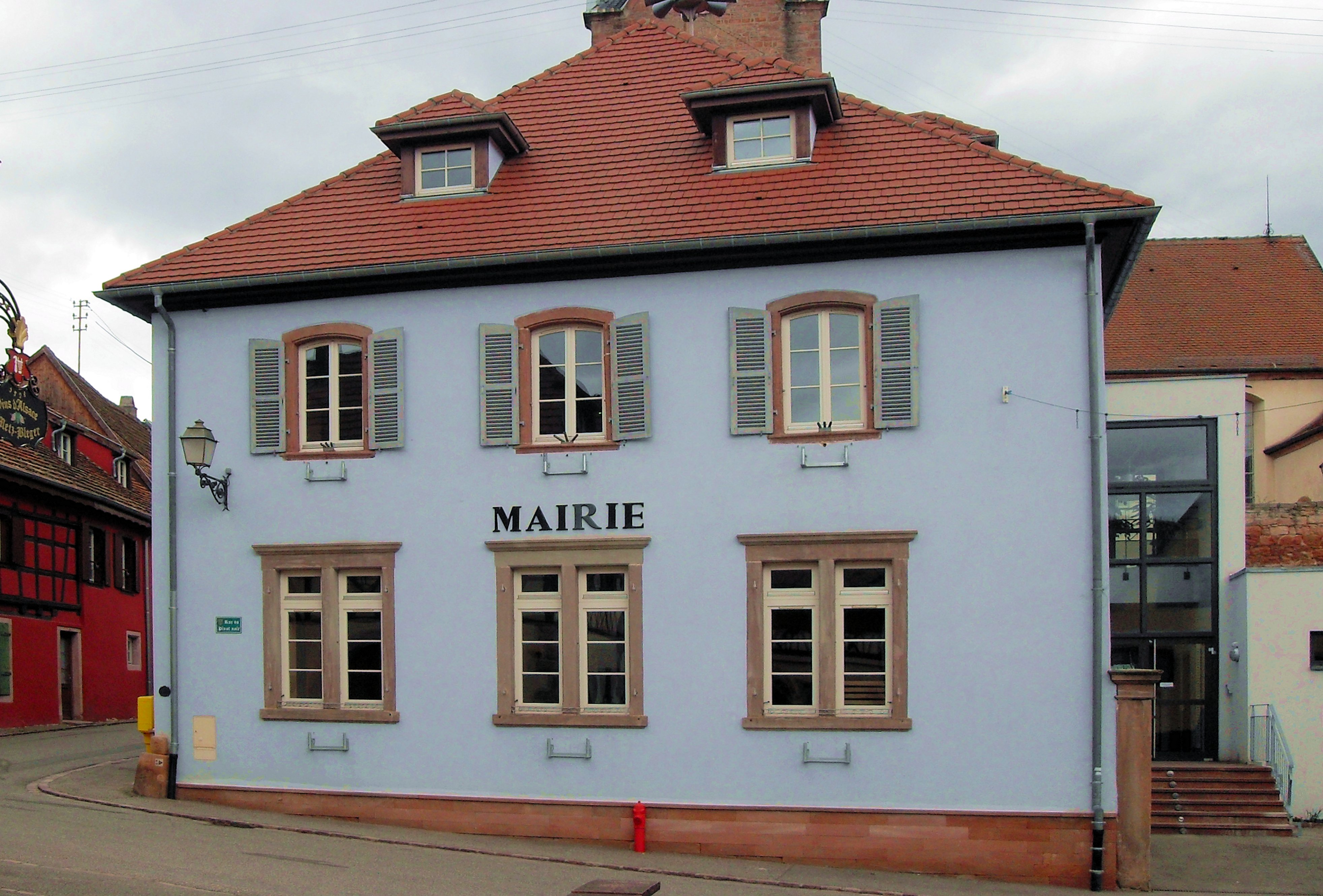 La mairie de Rodern